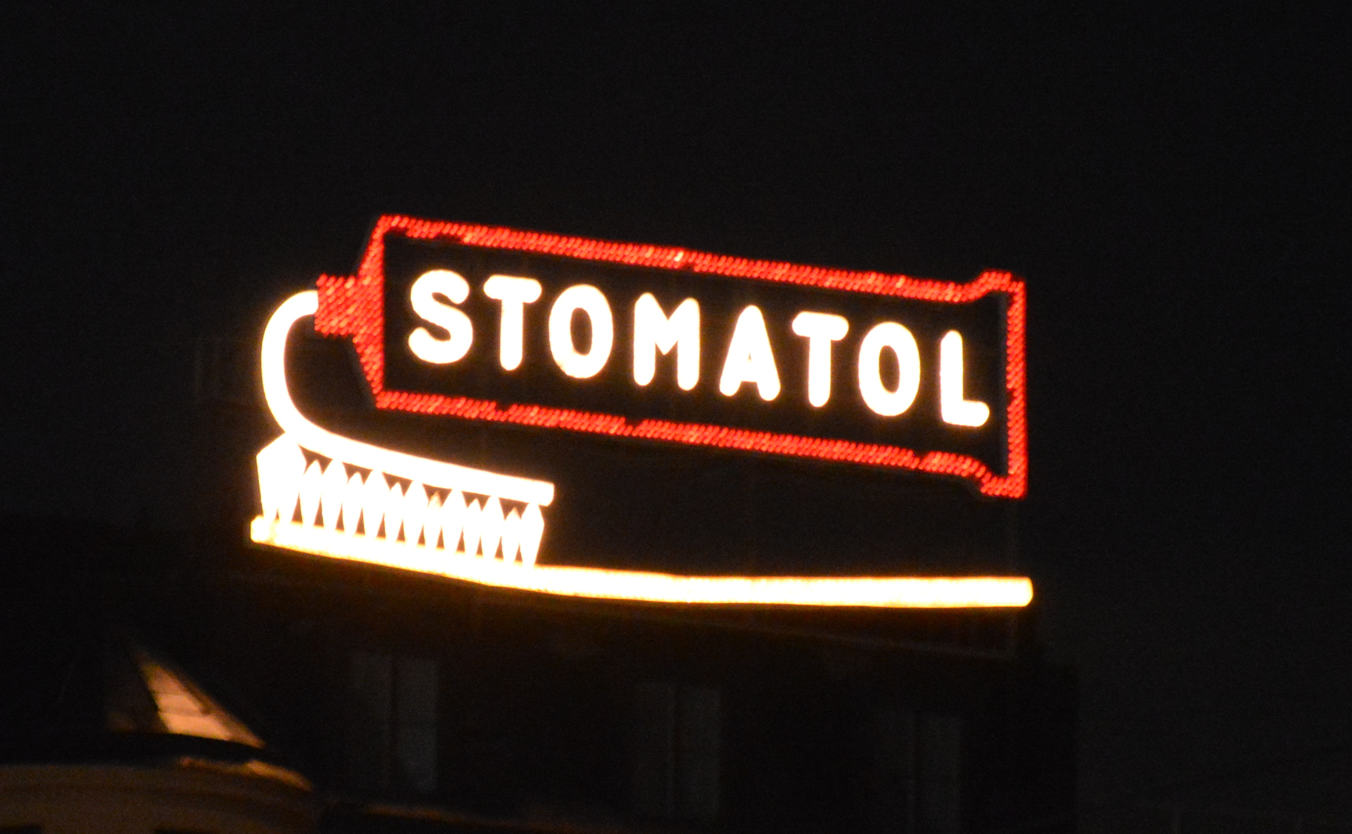 Stomatol-Werbung in Stockholm, Södermalm